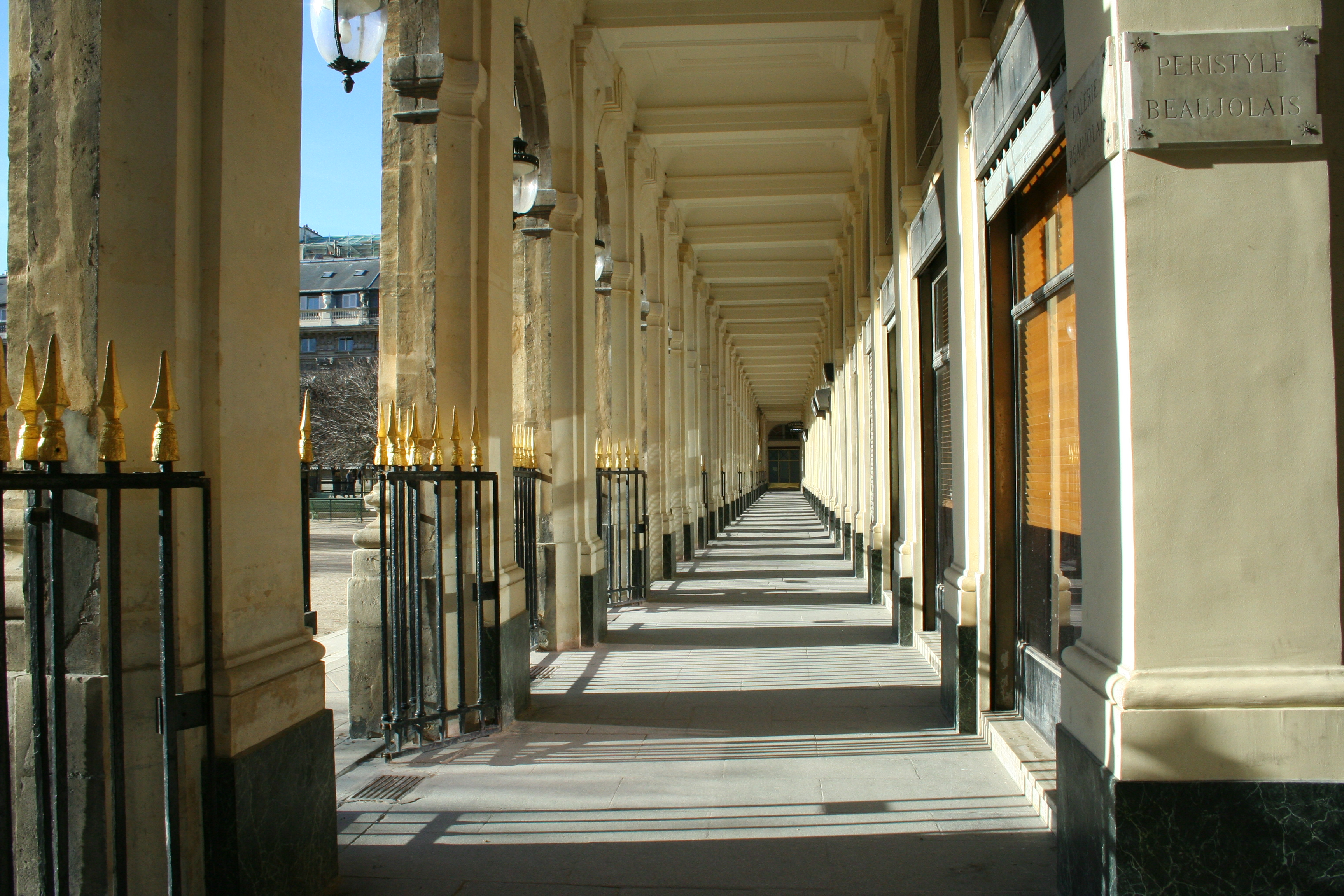 Palais-Royal (Paris) - Gallerie de Beaujolais.